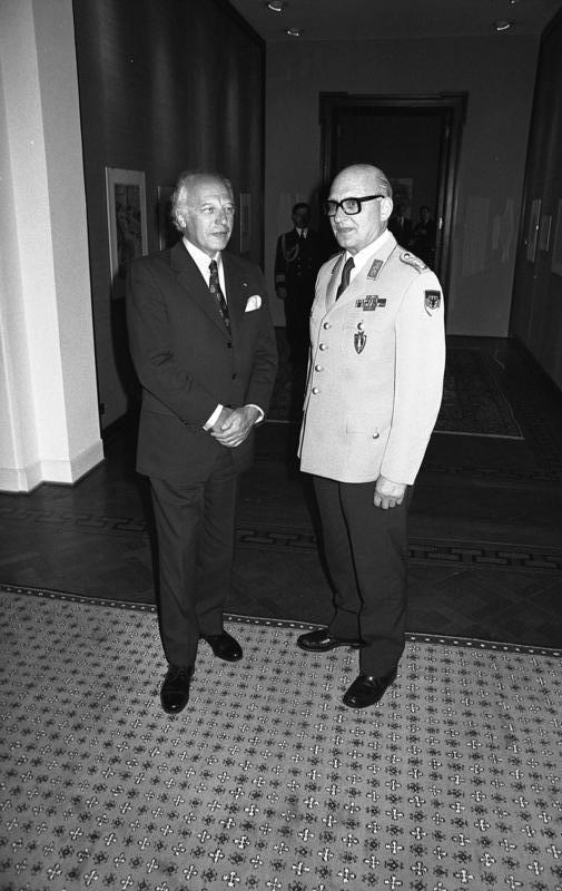 Bundespräsident Walter Scheel empfängt den Oberbefehlshaber der Alliierten Streitkräfte Europa-Mitte, General Dr. Karl Schnell im Bundespräsidial-Amt (Antrittsbesuch)